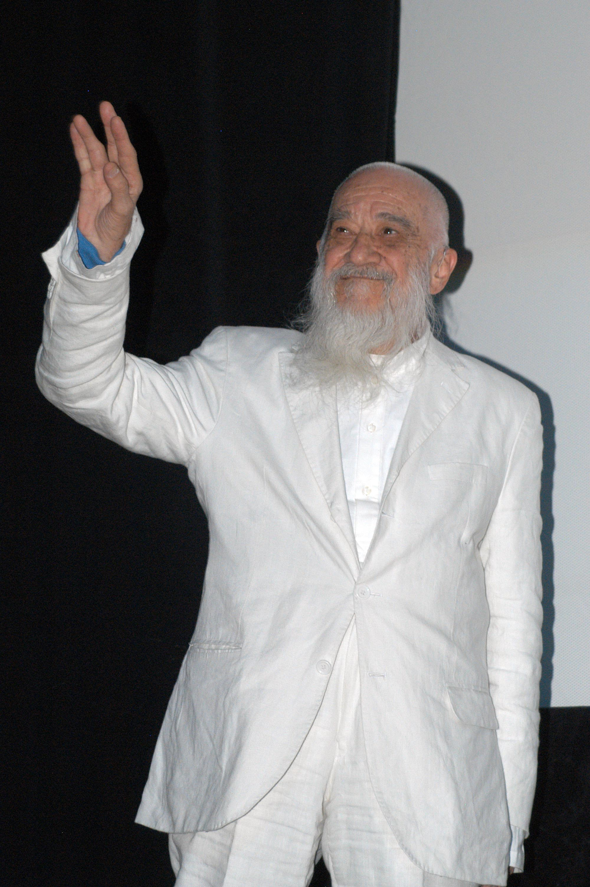 Fernando Birri, cineasta argentino en la alfombra roja de los premios